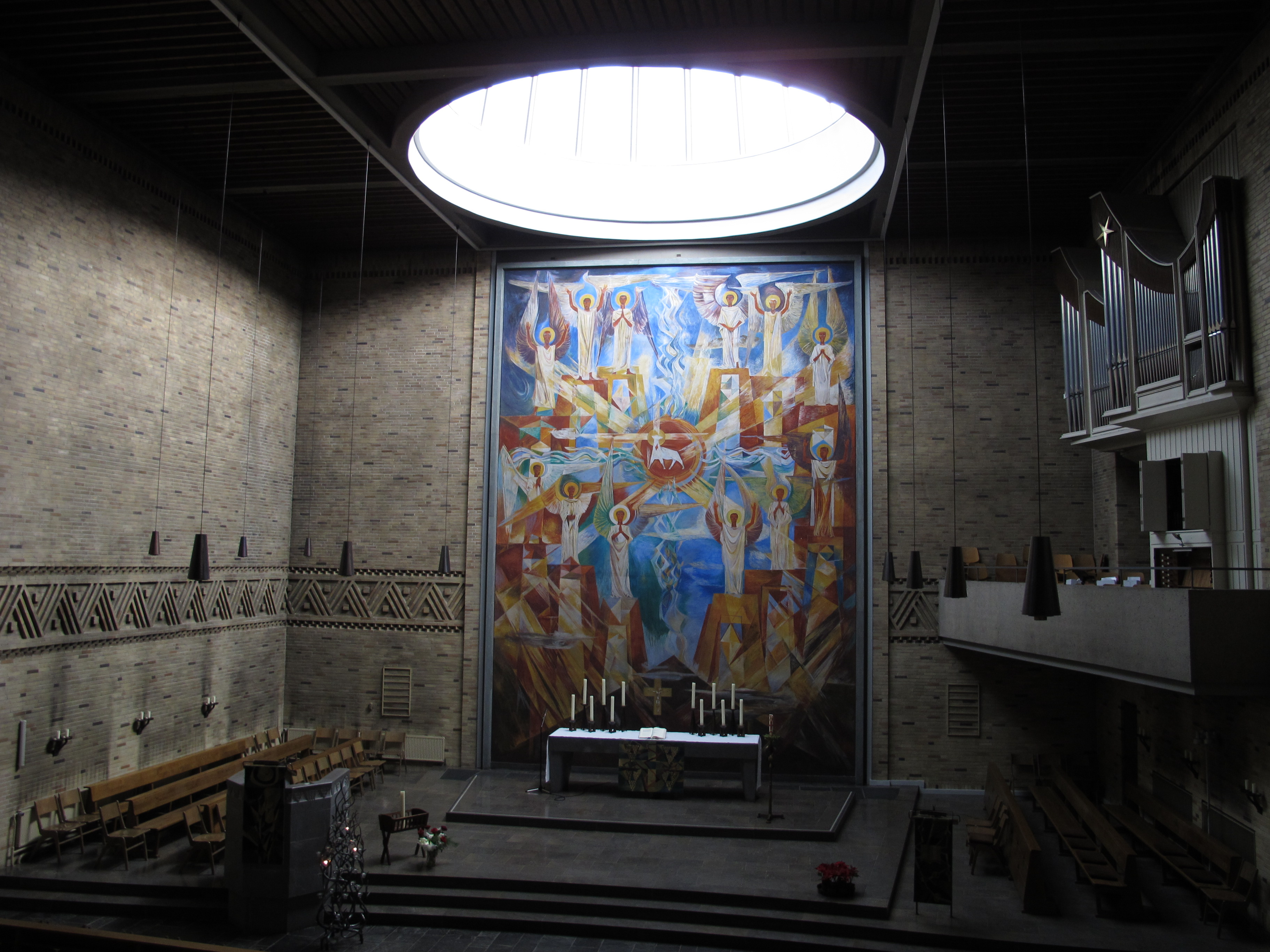 Hannover - Mutterhauskirche der Henriettenstiftung in der Marienstraße. Das Altarbild zeigt das himmlische Jerusalem.